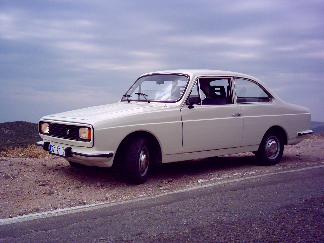 Türkiye'de seri olarak üretilen ilk otomobil markası Anadol'dan bir görünüm.